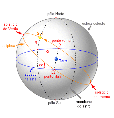 Esfera celeste Criada e publicada no meu site pessoal em